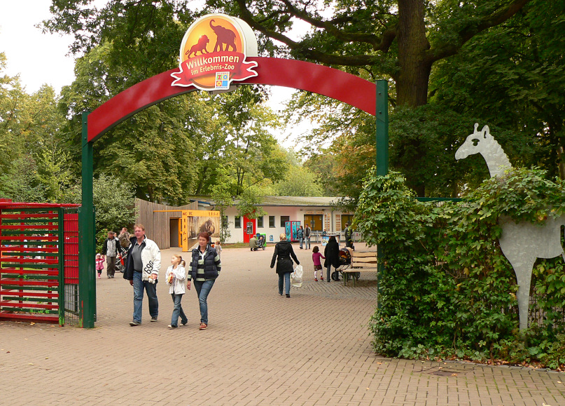 Eingang Zoo Hannover